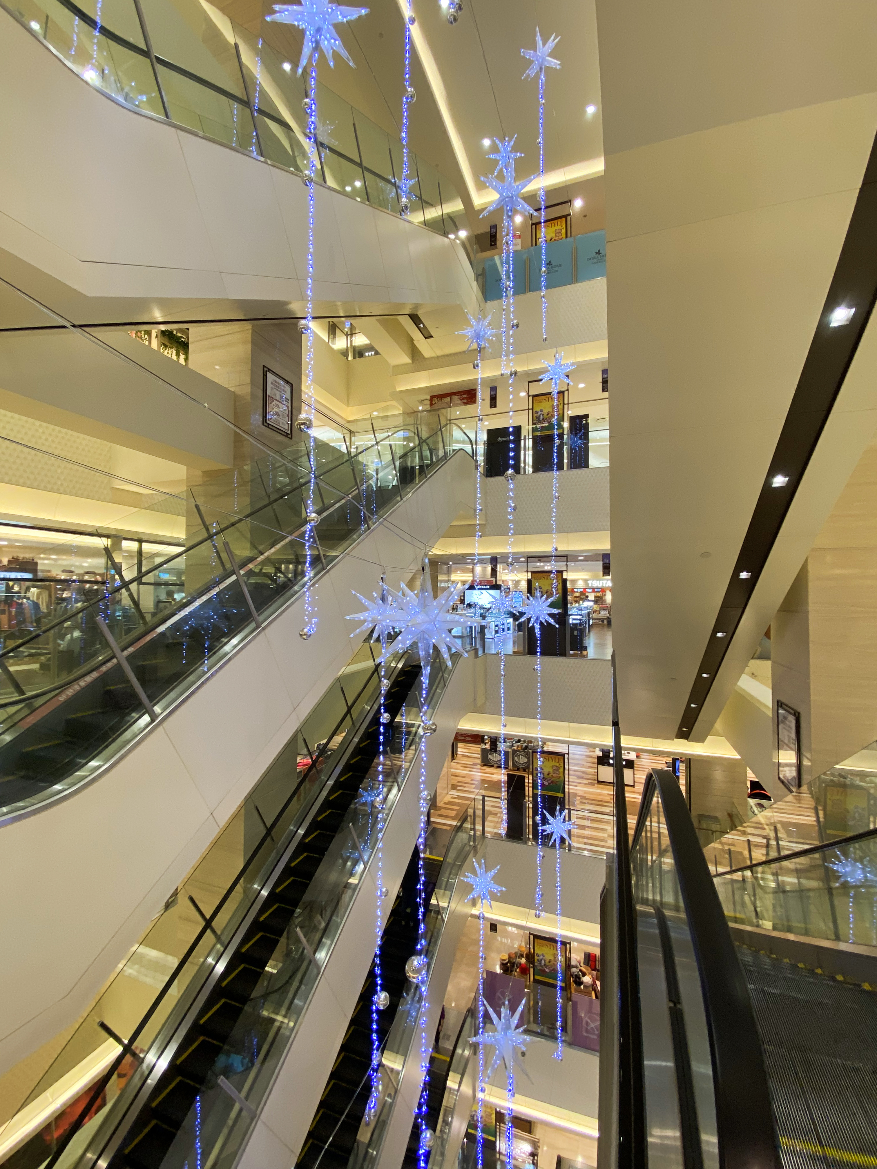 Uni-President Department Store Taipei